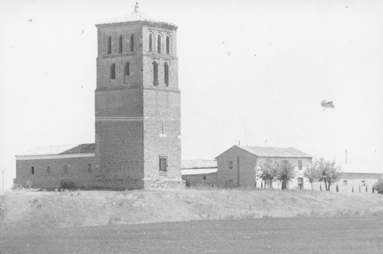 Iglesia de Nuestra Señora de las Eras. Torre - Bustillo de Chaves (Valladolid) - Álbum 200 x 140 - Fotografía. Papel 120 x 80 B/N